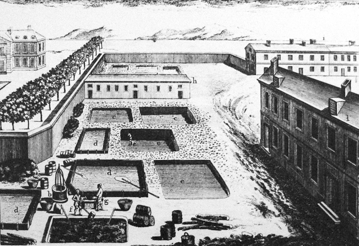 Planches de l'Encyclopédie de Diderot et d'Alembert, volume 3